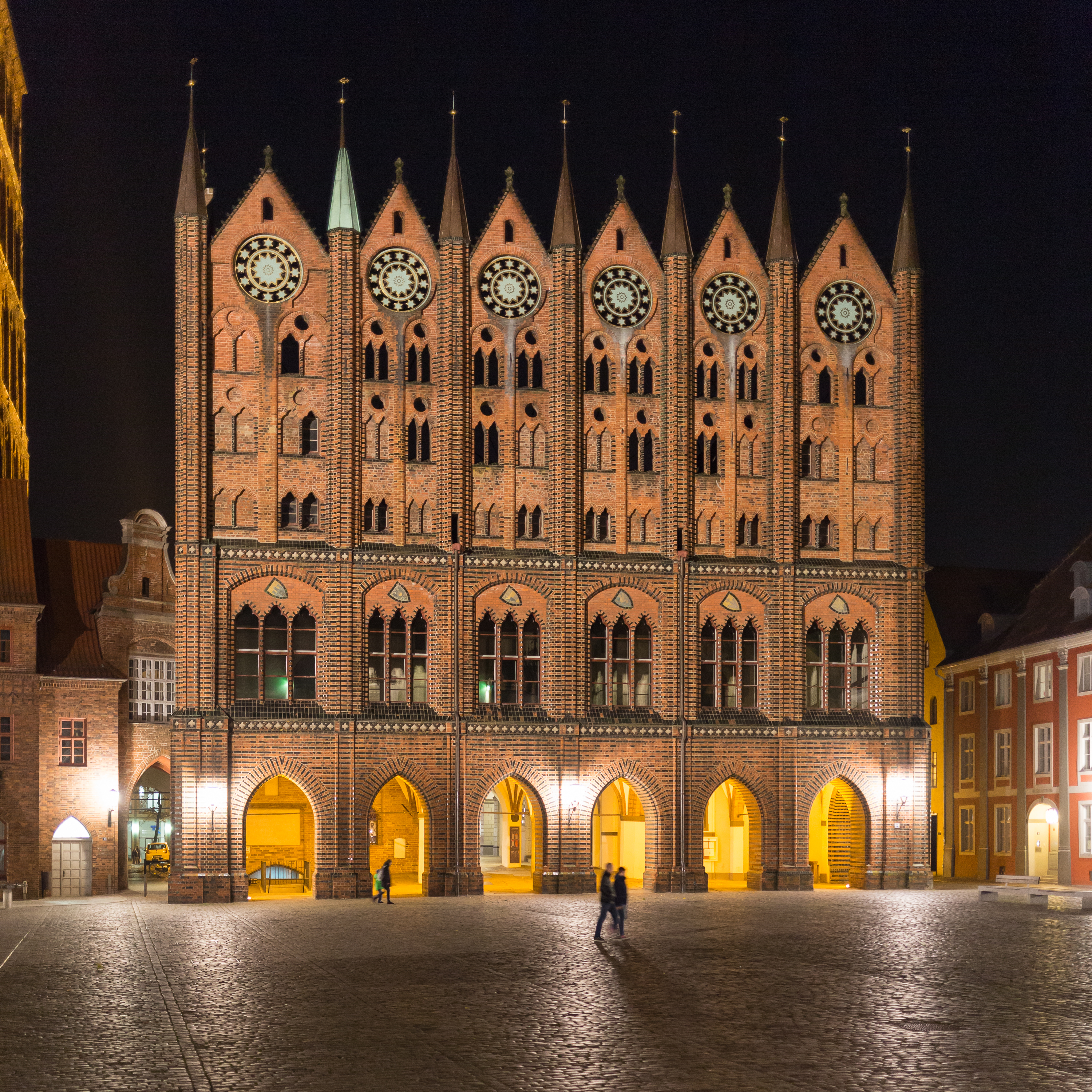 Rathaus Stralsund nächtlich erleuchtet